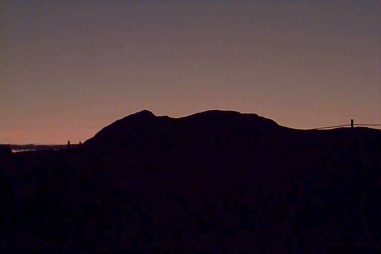 Foto på Oldklumpen sett från Olden.